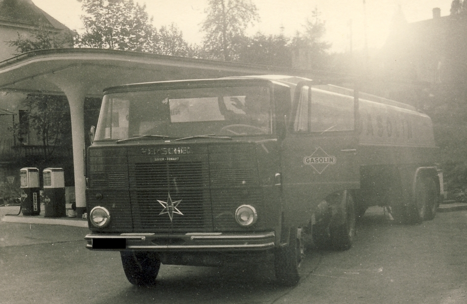 Henschel Tankwagen